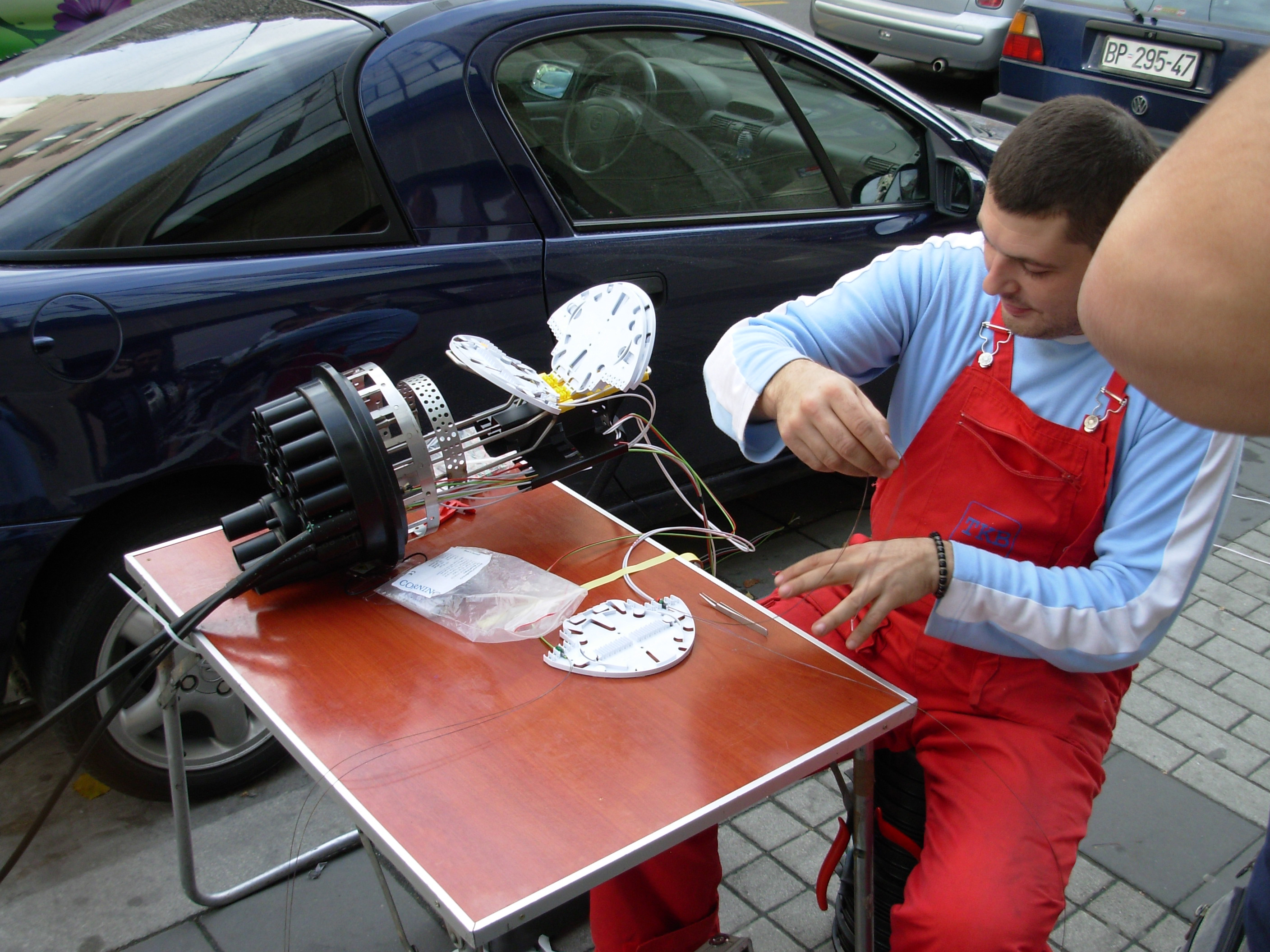 Спајање оптичког кабла Београд, Србија. Снимио Голдфингер